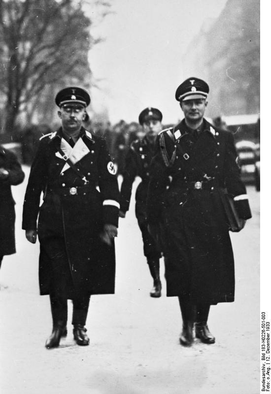 Berlin, Reichstagseröffnung, Himmler, Karl Wolff (r.) Zentralbild Reichstagseröffnung am 12. Dezember 1933, nach den Reichstagswahlen vom 12.11., in der Krolloper am Königsplatz in Berlin. UBz.:der Reichsführer - SS Heinrich Himmler (links) trifft mit seinem Adjutanten SS-Oberführer Karl Wolff zur Reichstagssitzung ein. 42745-33 [Scheerl Bilderdienst] Abgebildete Personen: Himmler, Heinrich: Reichsführer der SS, Deutschland (GND 11855123X) Wolff, Karl: SS-Obergruppenführer, General, Adjutant Heinrich Himmlers, 1964 vom Schwurgericht München zu 15 Jahren Zuchthaus verurteilt, Bundesrepublik Deutschland